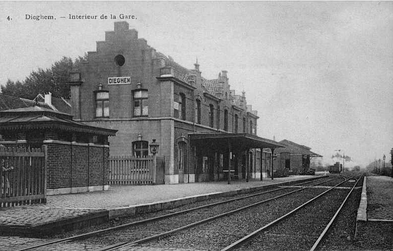 L'intérieur de la gare avec son bâtiment vers 1900.